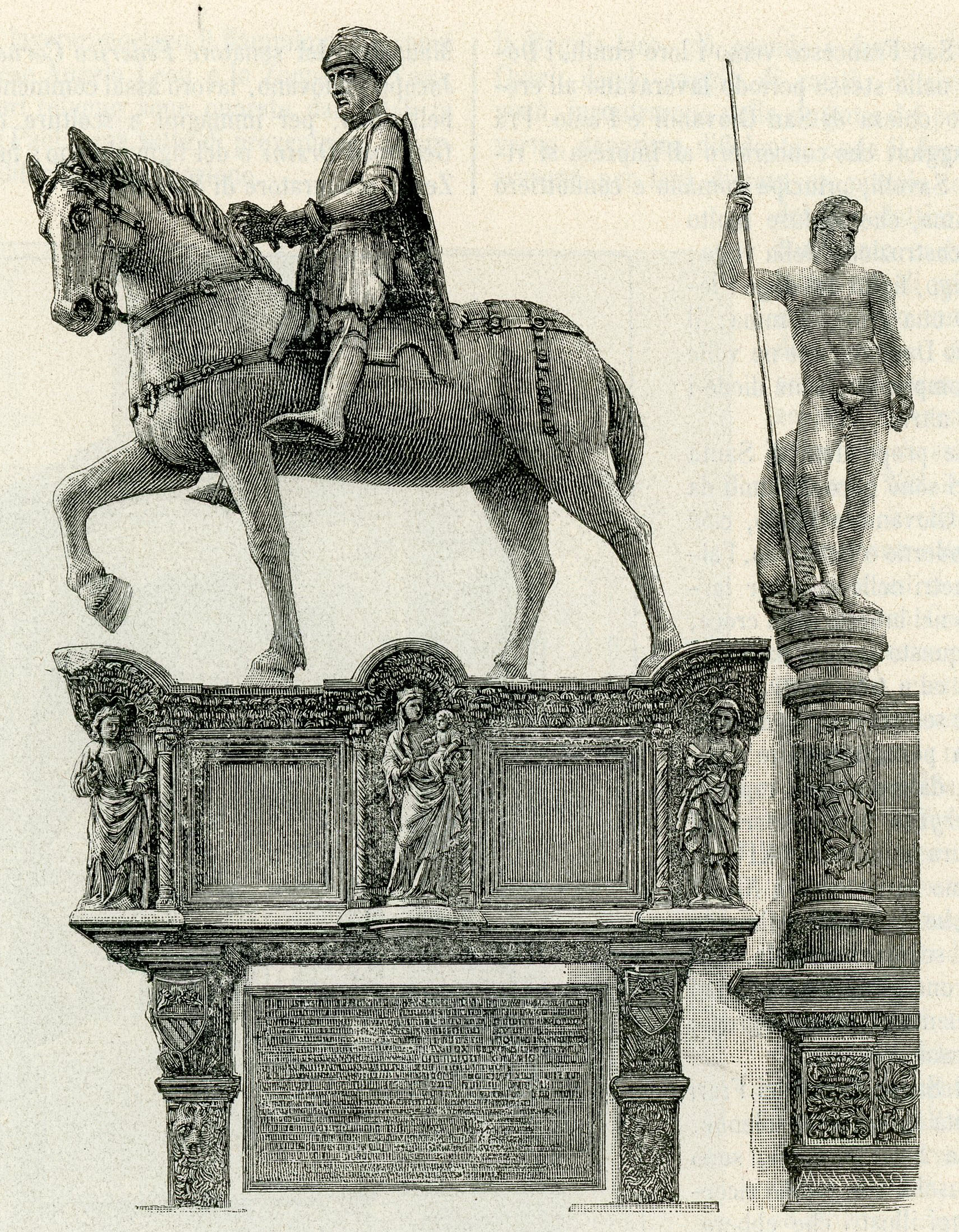 Venezia (chiesa di S. Maria dei Frari): monumento a Paolo Savelli.